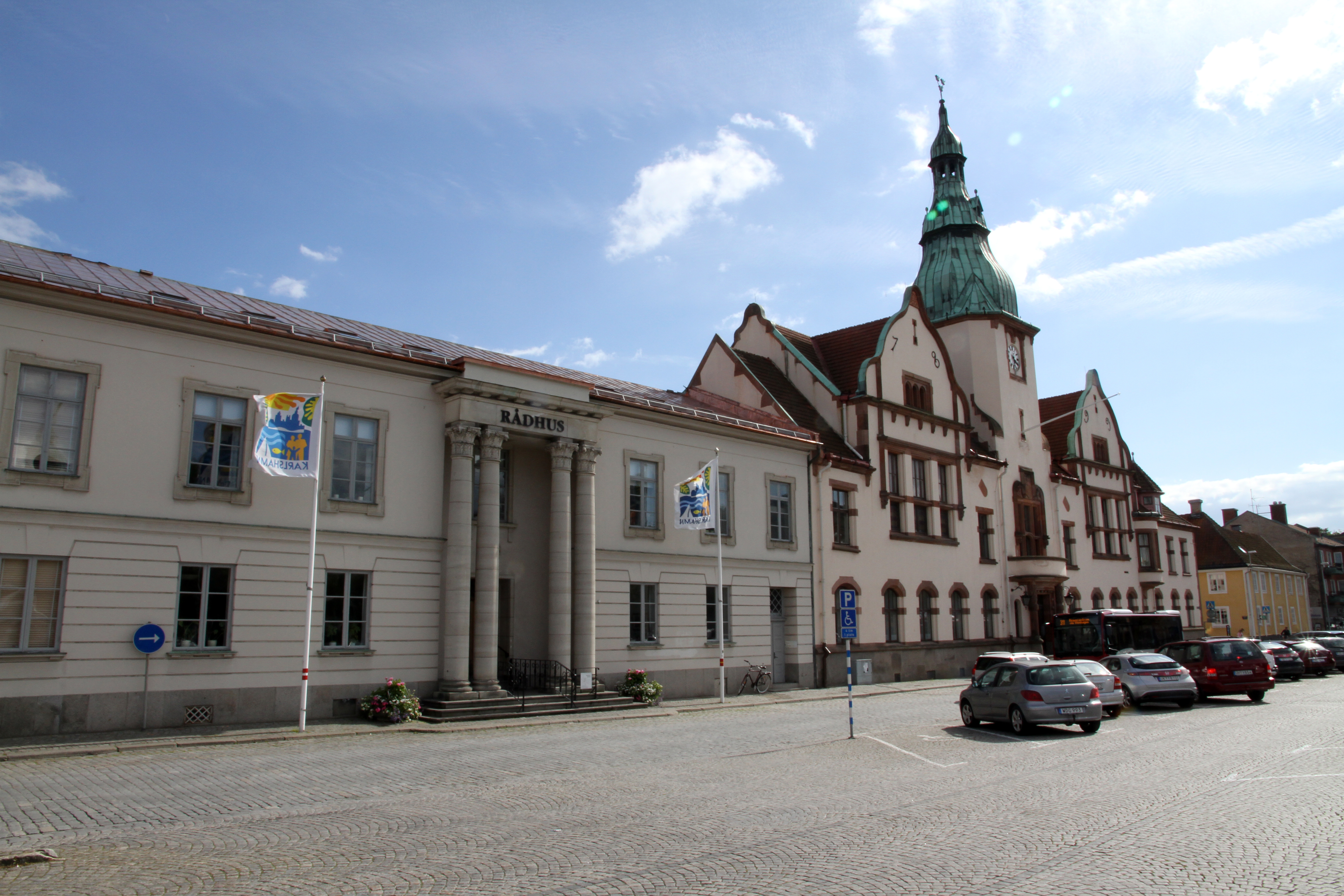 Karlshamns Rådhus 21 juli 2015